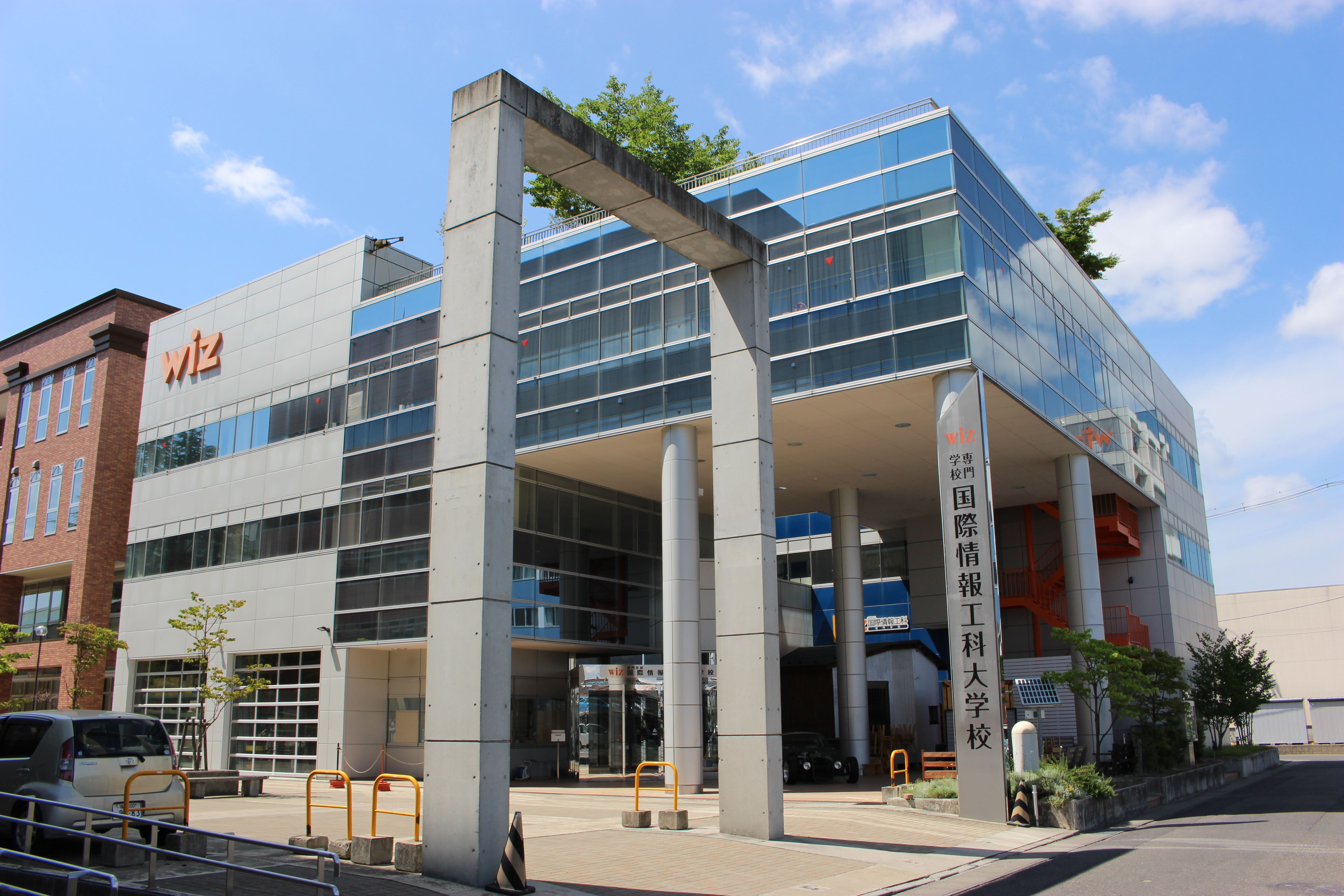 wiz国際情報工科専門大学校